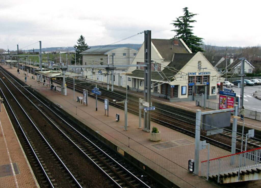 La gare d'Épône (Yvelines) Photo JH Mora, janvier 2005 Epone Catégorie:Image d'Épône